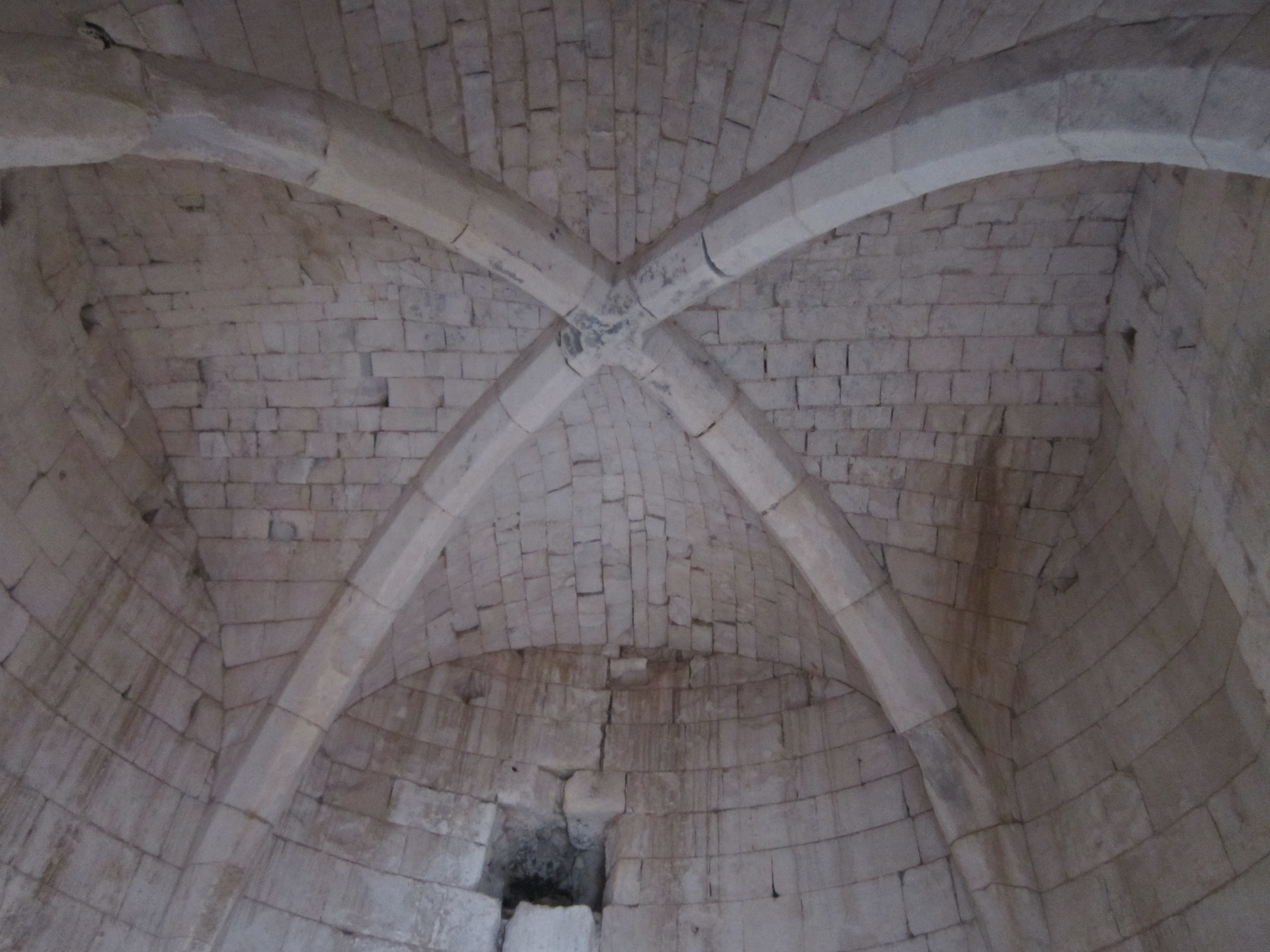 La voûte en croisée d'ogive, gothique flamboyant. Chateau d'Eaucourt sur Somme, Picardie